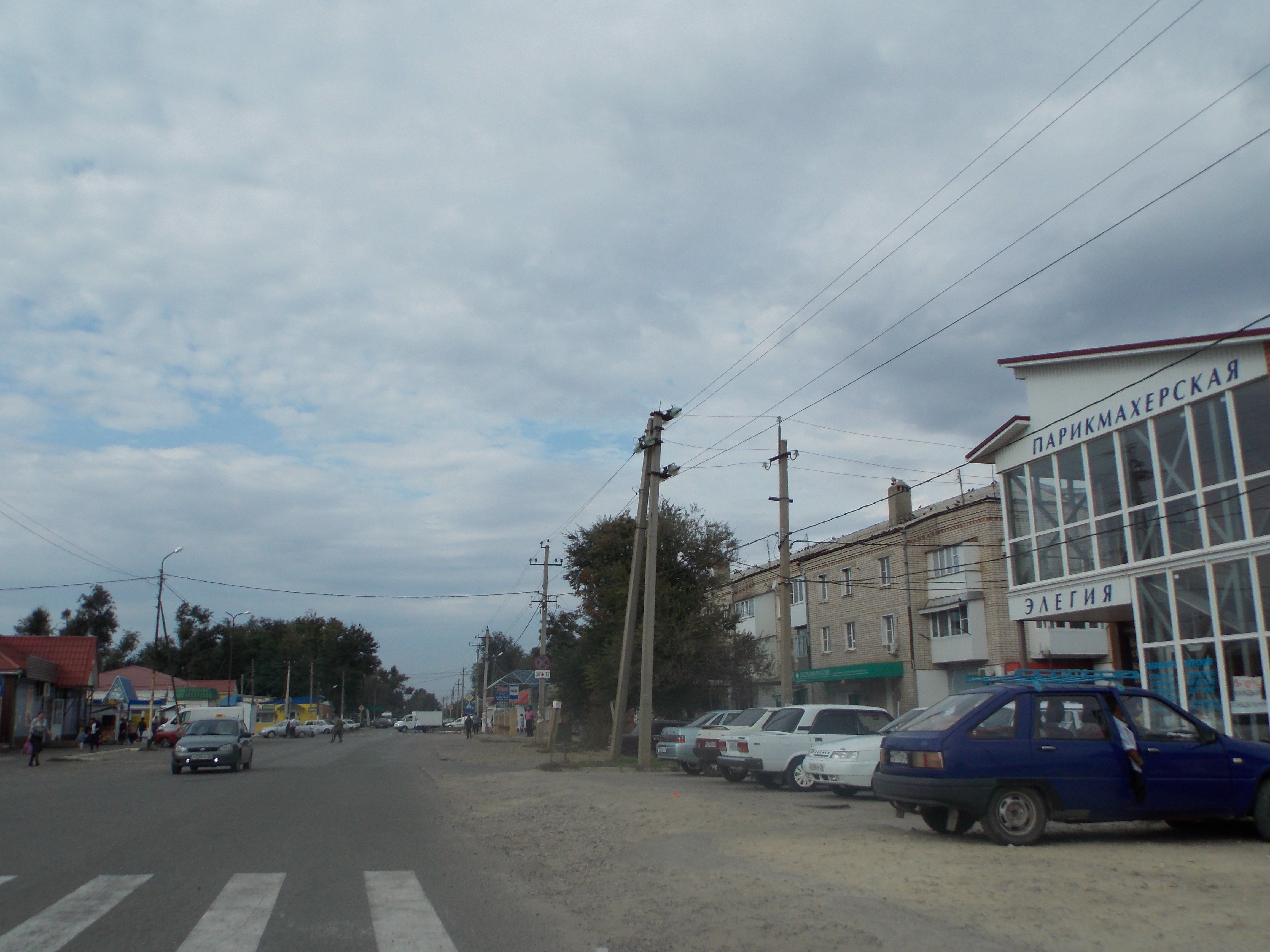 Дивное, Ставропольский край